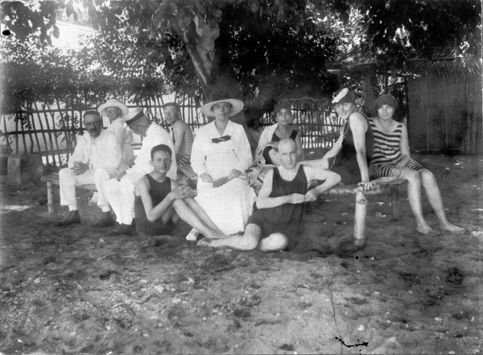 Foto. Foto bersama orang Belanda di pantai Pasir Putih, Jember selatan, Jawa Timur.